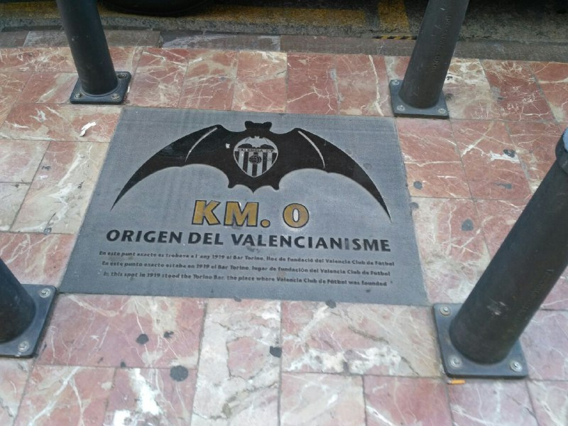 Emplazamiento del Bar Torino, donde se fundó el Valencia Club de Fútbol